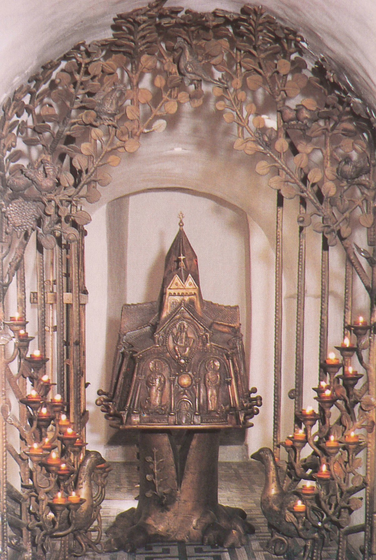 eigene Datei